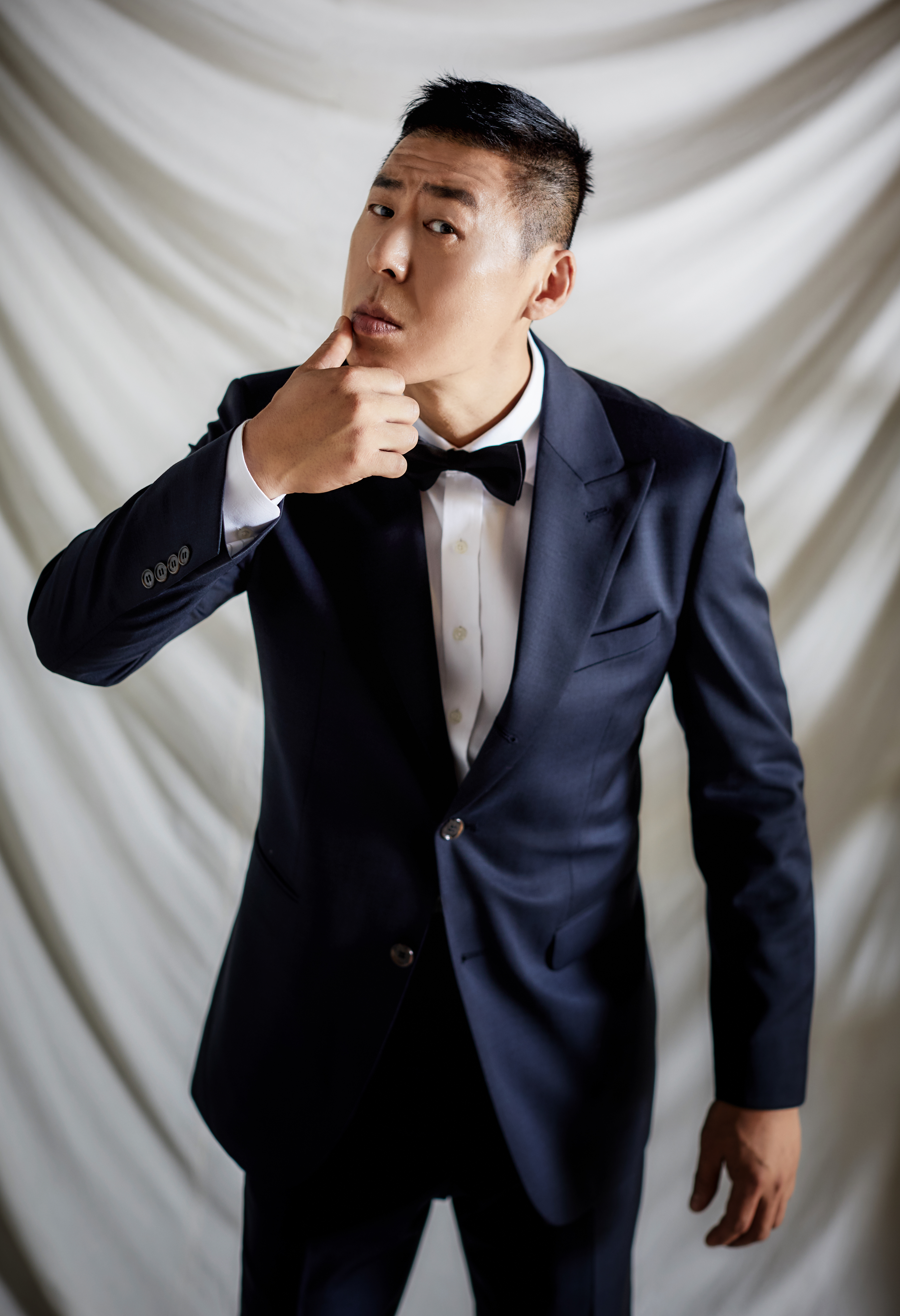 노이즈 한상일 웨딩촬영